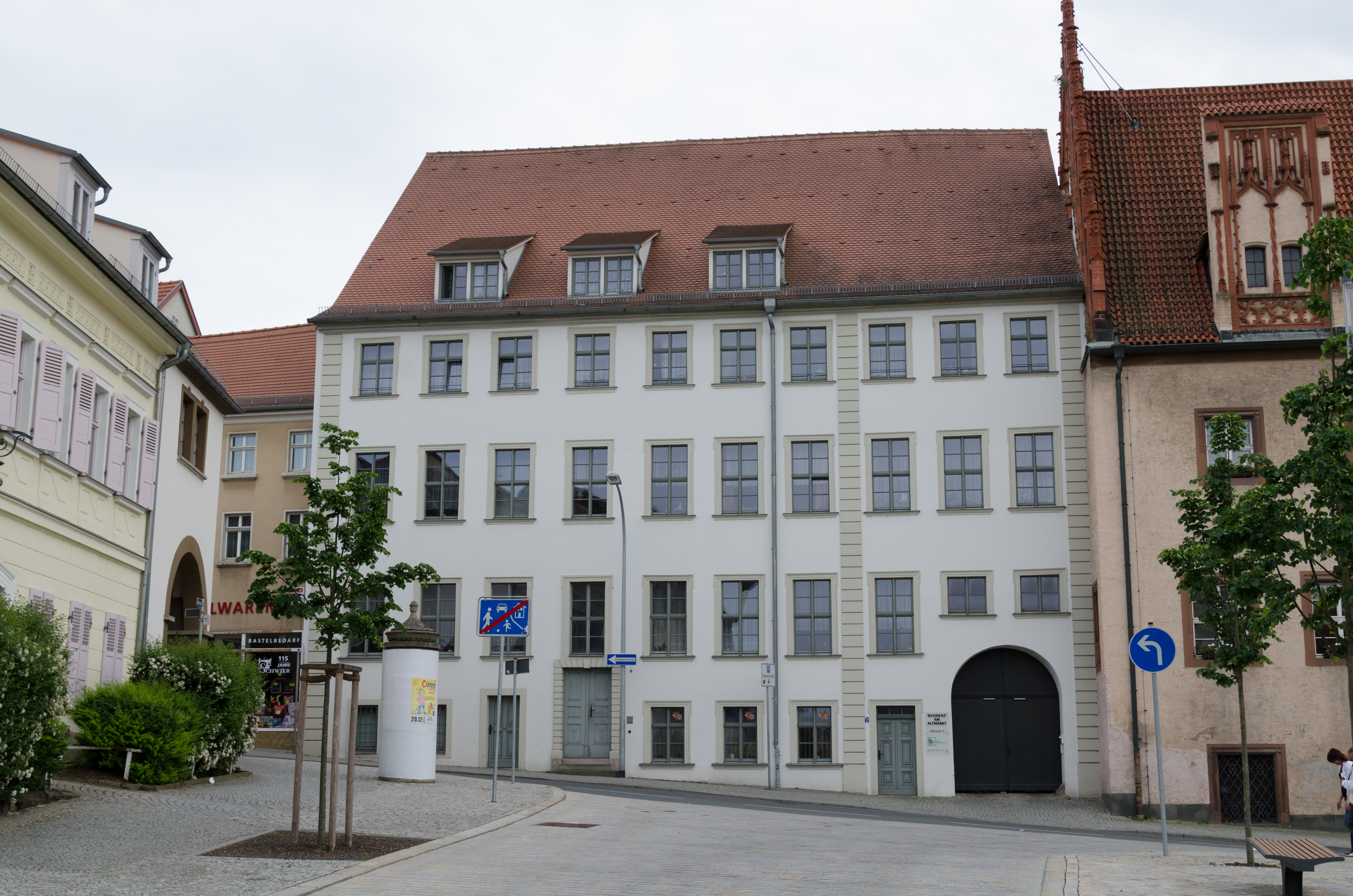 Zeitz, Altmarkt 2